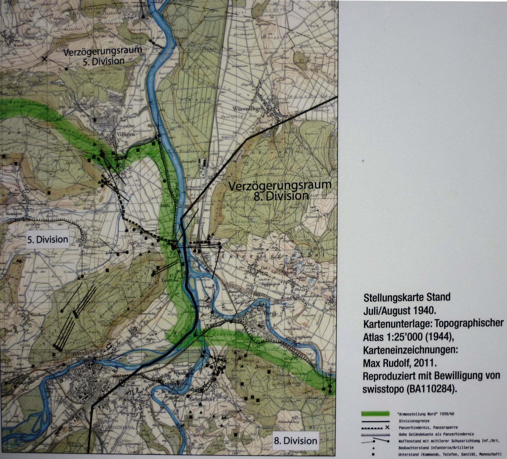 Stellungskarte Wasserschloss, Schweiz: Infotafel am Reussbunker